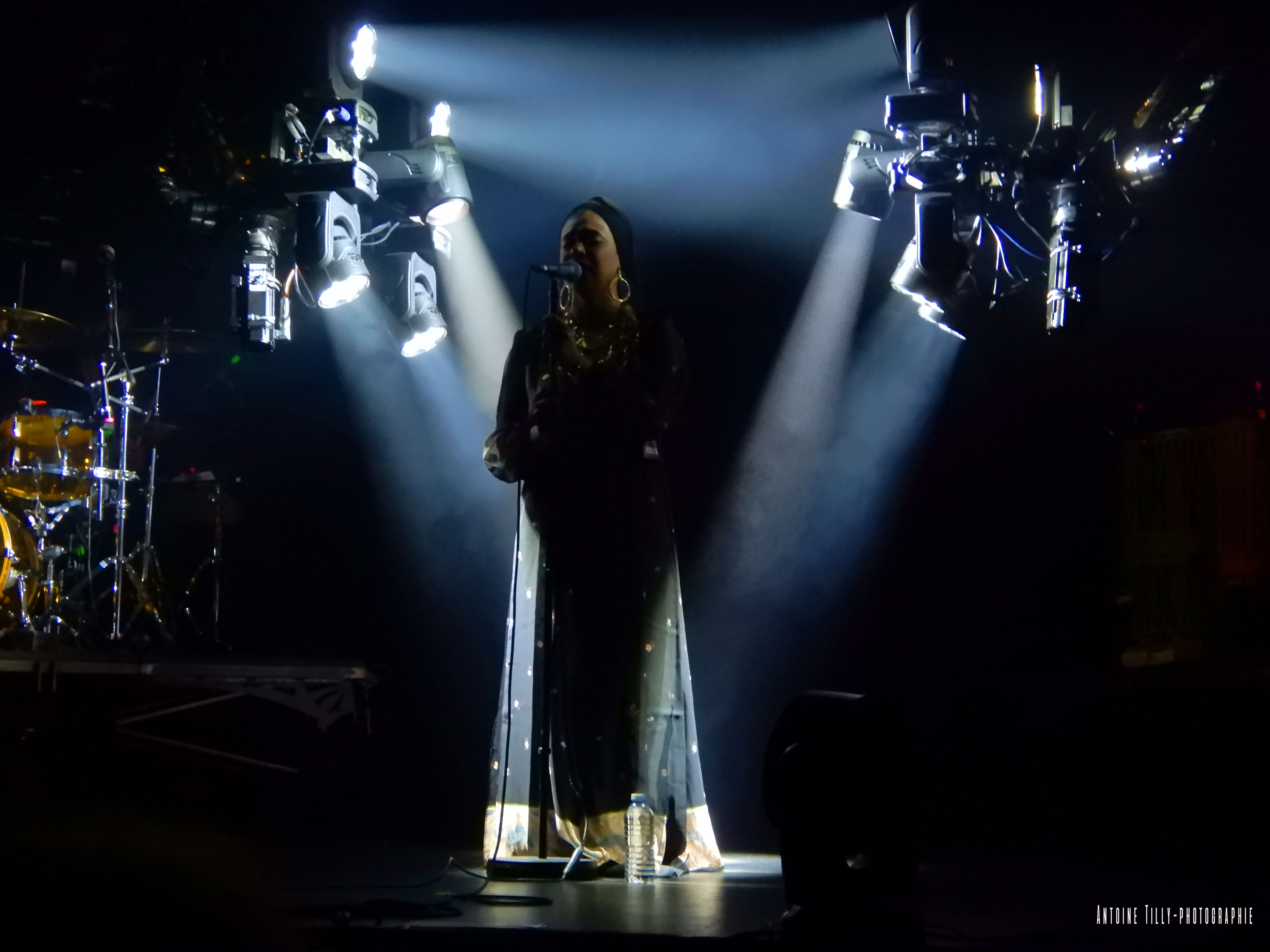 Orange Blossom, Vitré samedi 27 avril 2019